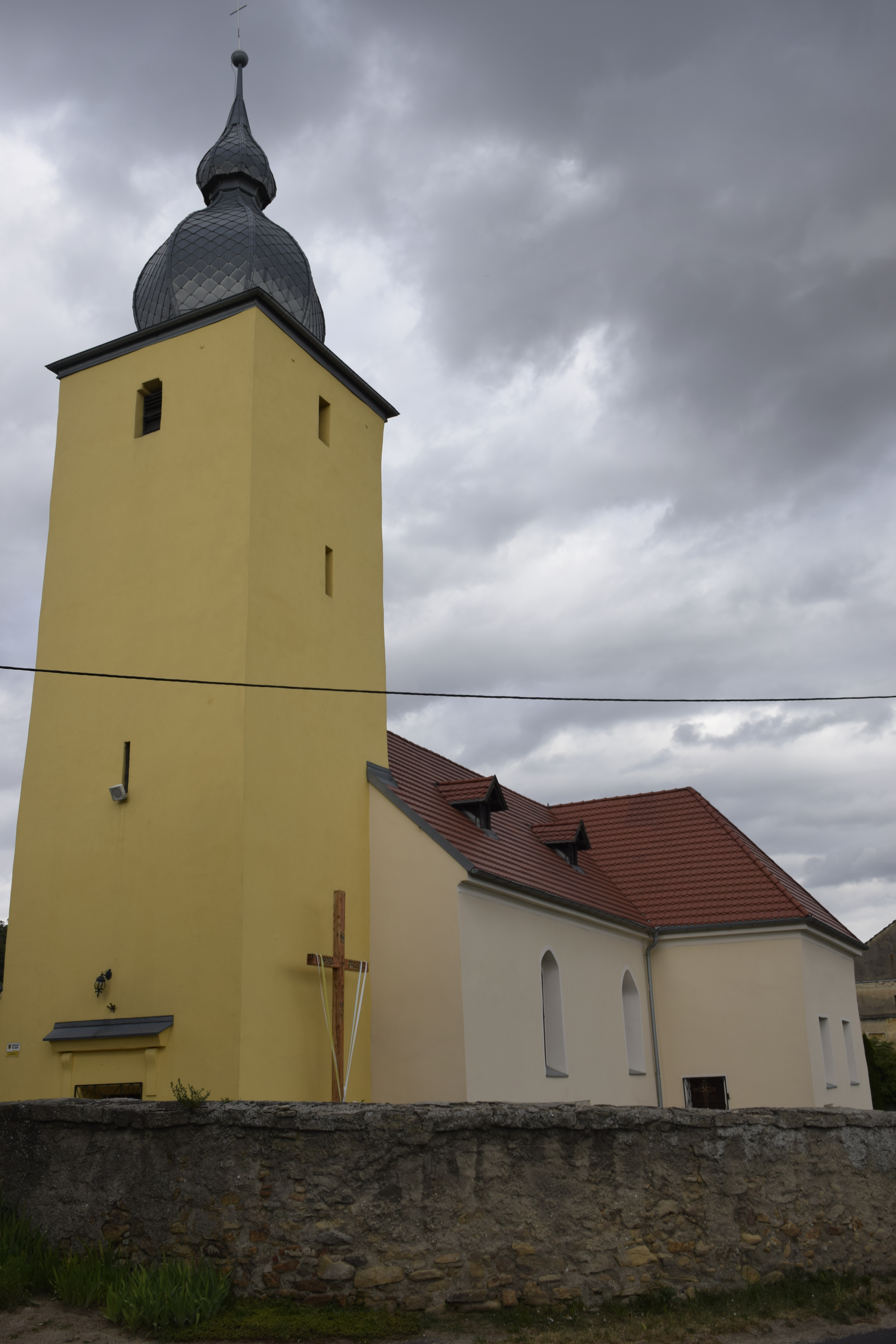 Kostrza (województwo dolnośląskie). Polska.